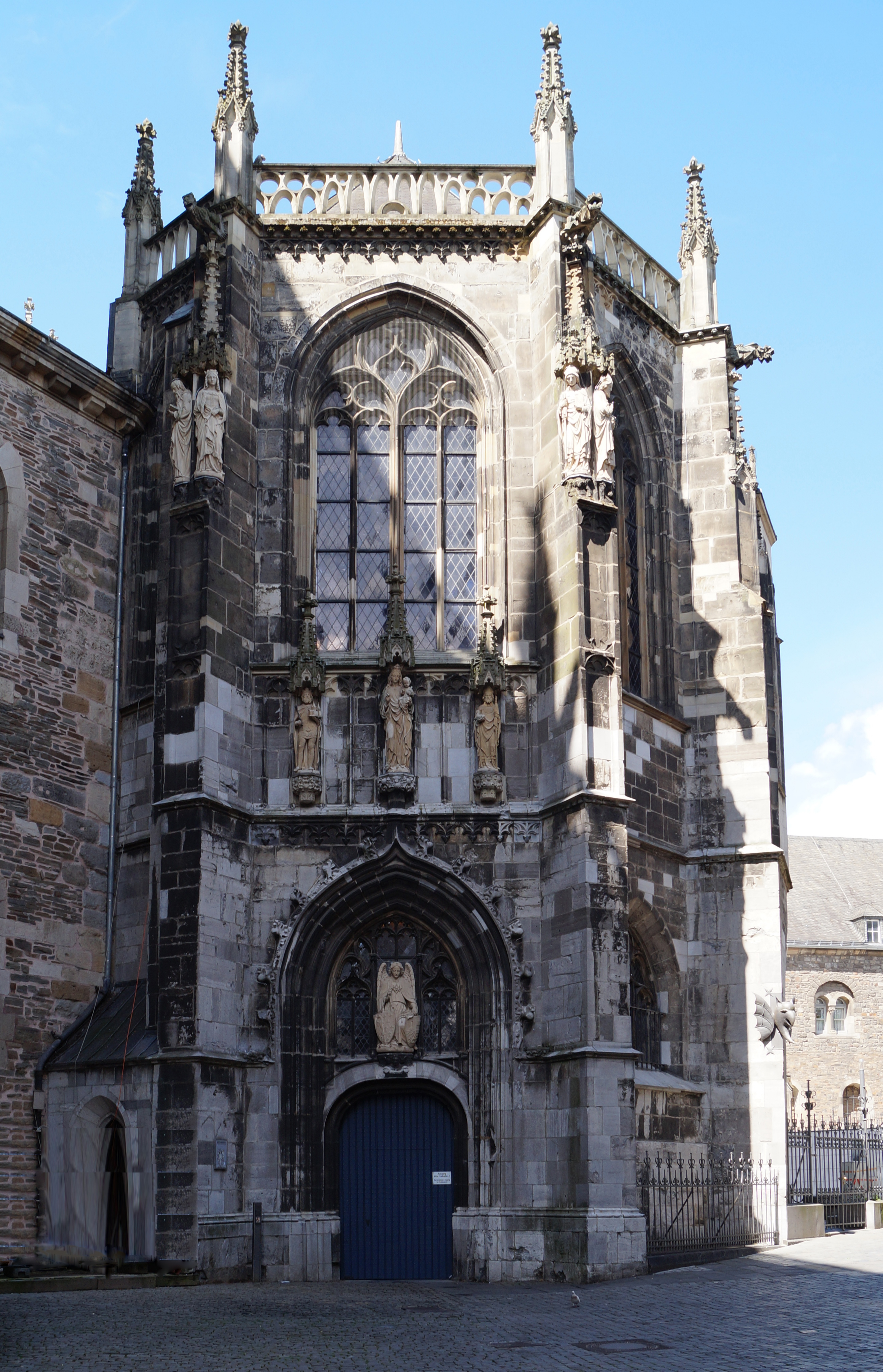 Aachener Dom Karls- und Hubertuskapelle